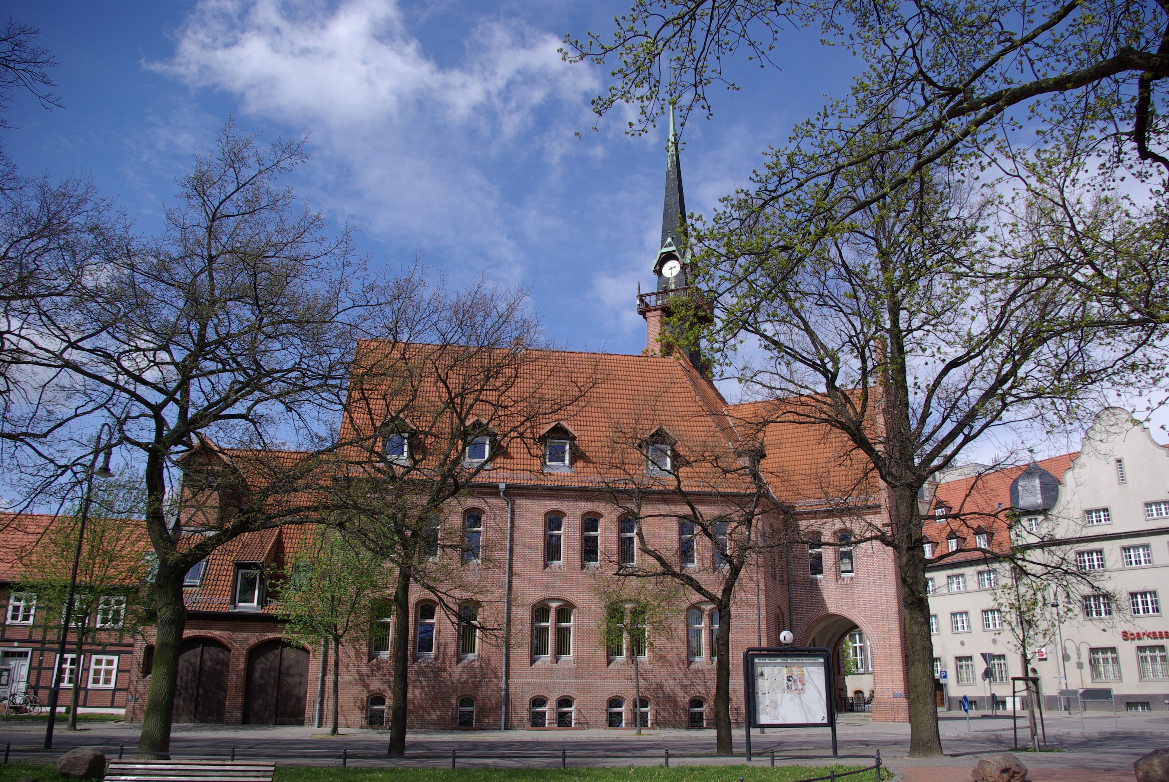 Nauen in Brandenburg. Das Rathaus wurde von 1888 bis 1891 errichtet. Es steht unter Denkmalschutz.